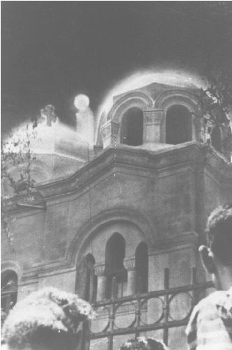 Angebliche Marienerscheinung über der koptischen Kirche von Zeitun (Kairo)[1]